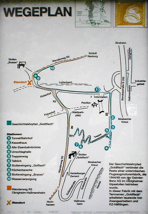 Infotafel am Goldfisch-Geschichtslehrpfad beim Außenkommando Neckarelz des KZ Natzweiler